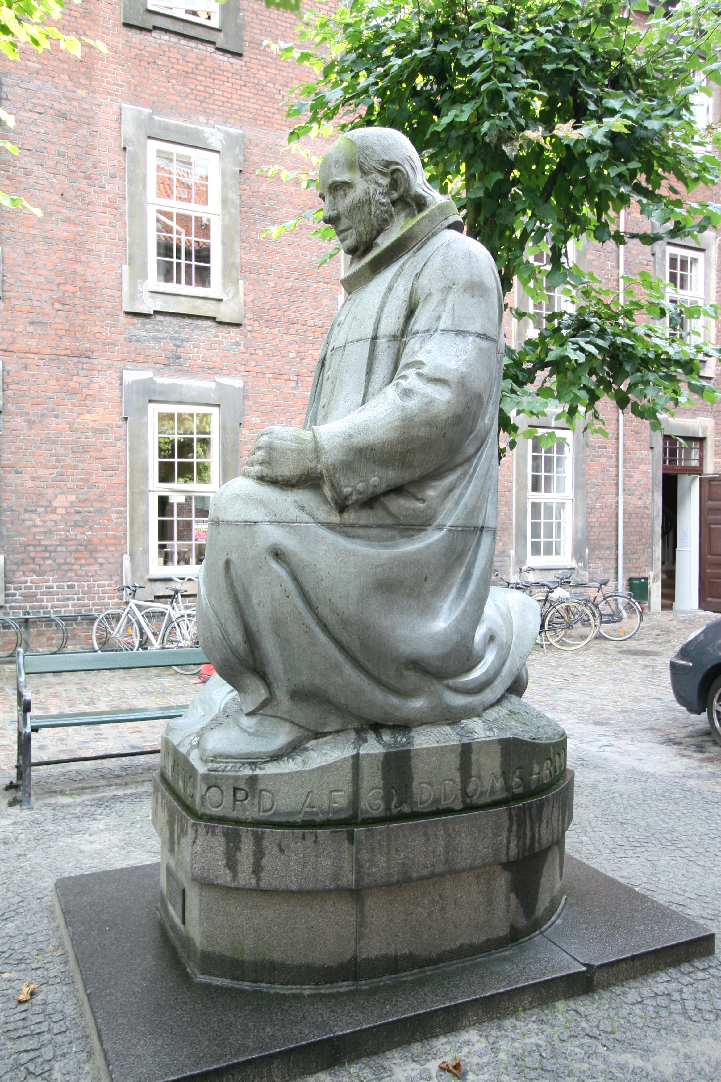 Sculpture of Grundtvig in Vartov, Copenhagen, Denmark. By Niels Skovgaard (1858-1938).